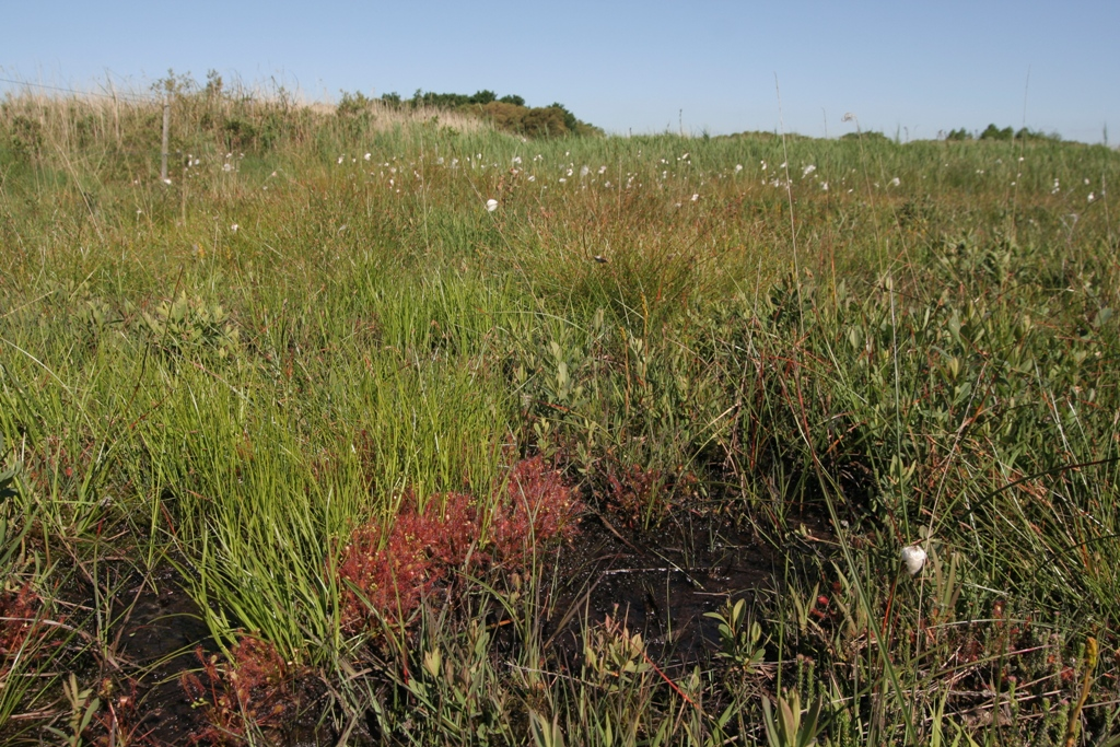 Vue générale de la tourbière acide